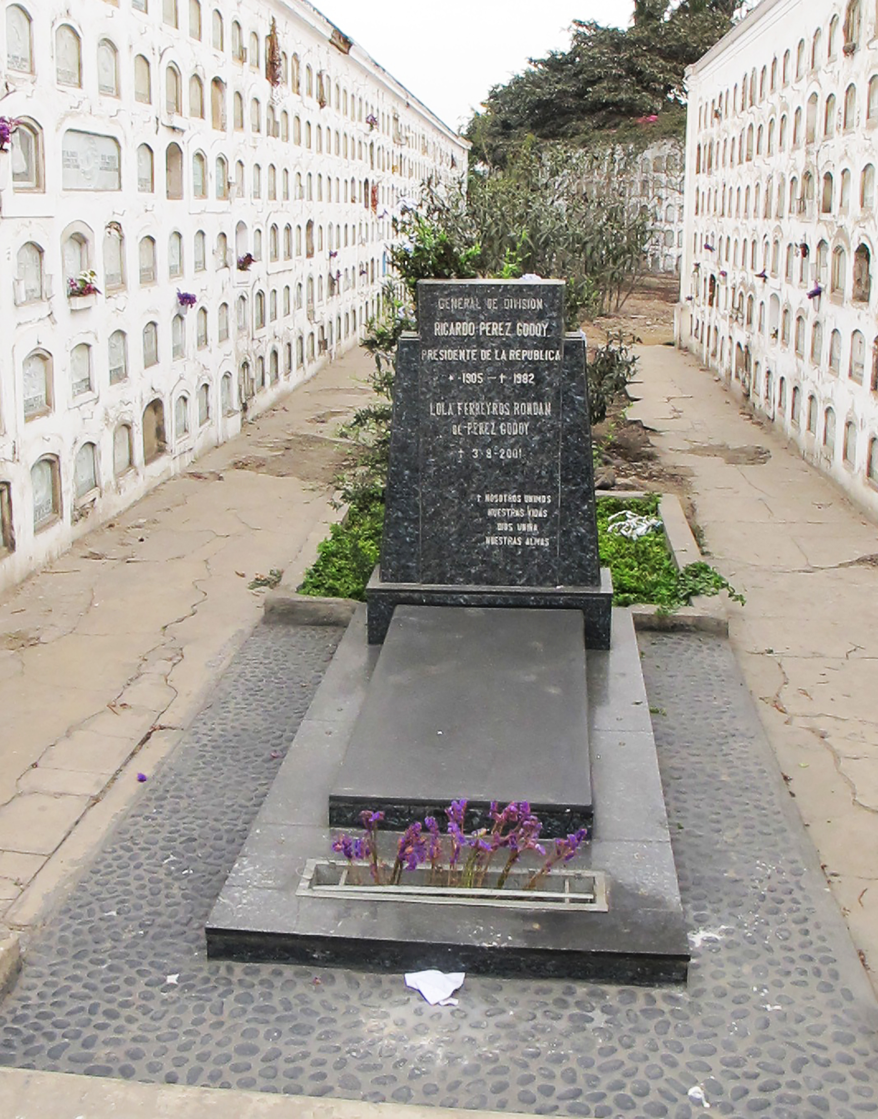 Tumba Ricardo Perez Godoy